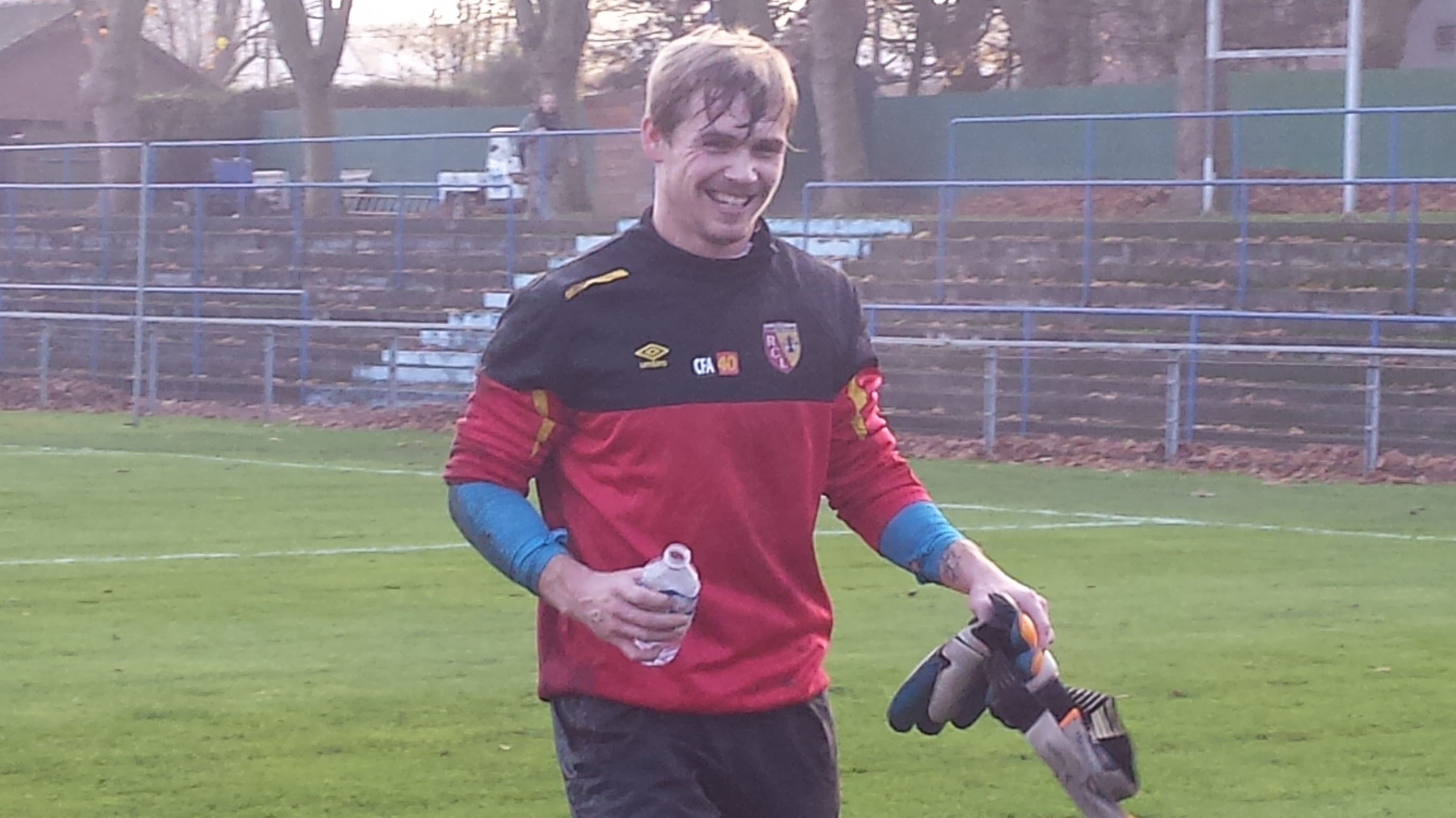 Jérémy Vachoux, gardien de la réserve du RC Lens, avant la rencontre Lens B - Quevilly, au Stade François Blin d'Avion, comptant pour la douzième journée de CFA Groupe A (Quatrième division française) de football.